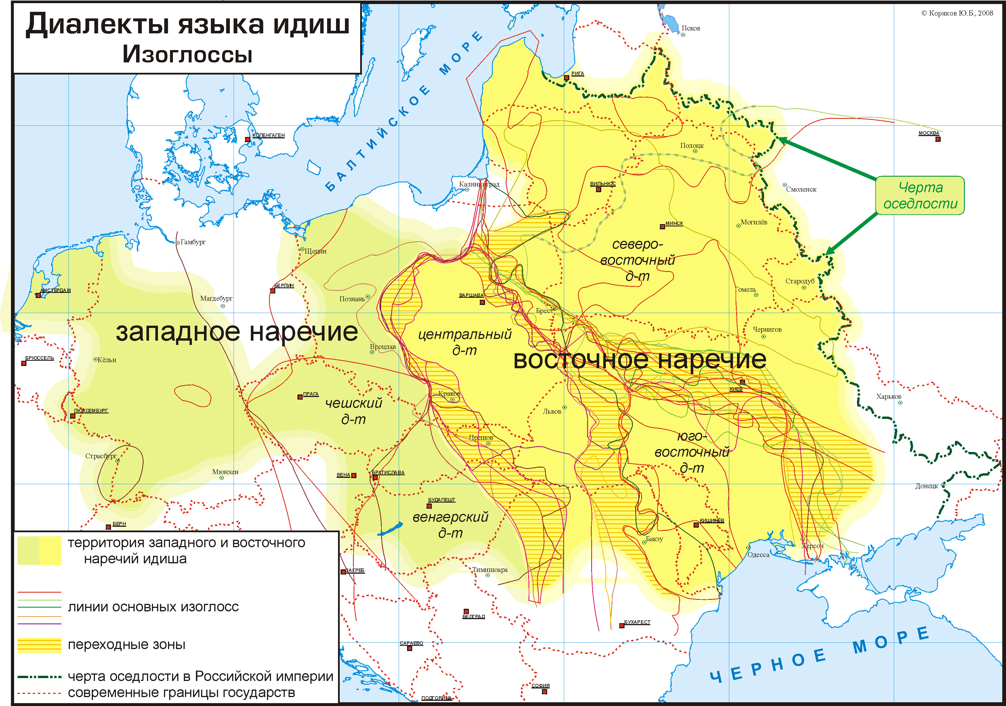 Карта, показывающая основные изоглоссы идишских диалектов. Сделана на основе карты в "Коряков Ю.Б. Диалекты идиша [2 карты] // Ежегодный альманах еврейской музыкальной культуры «Музыка идишкайта». 2006, Выпуск 2. Статьи и песни. Составители: А. Смирнитская, А. Пинский. — М.: «Memories», 2006. — 268 страниц с илл. ISBN 5-903116-04-3".